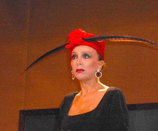 La actriz española Esperanza Roy.